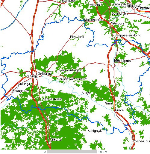 Carte du département Loiret Légende